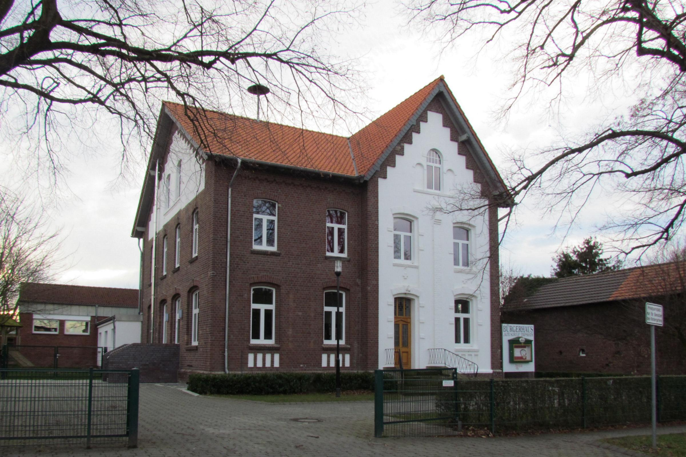 Alte Schule von Tripsrath, Bürgerhaus